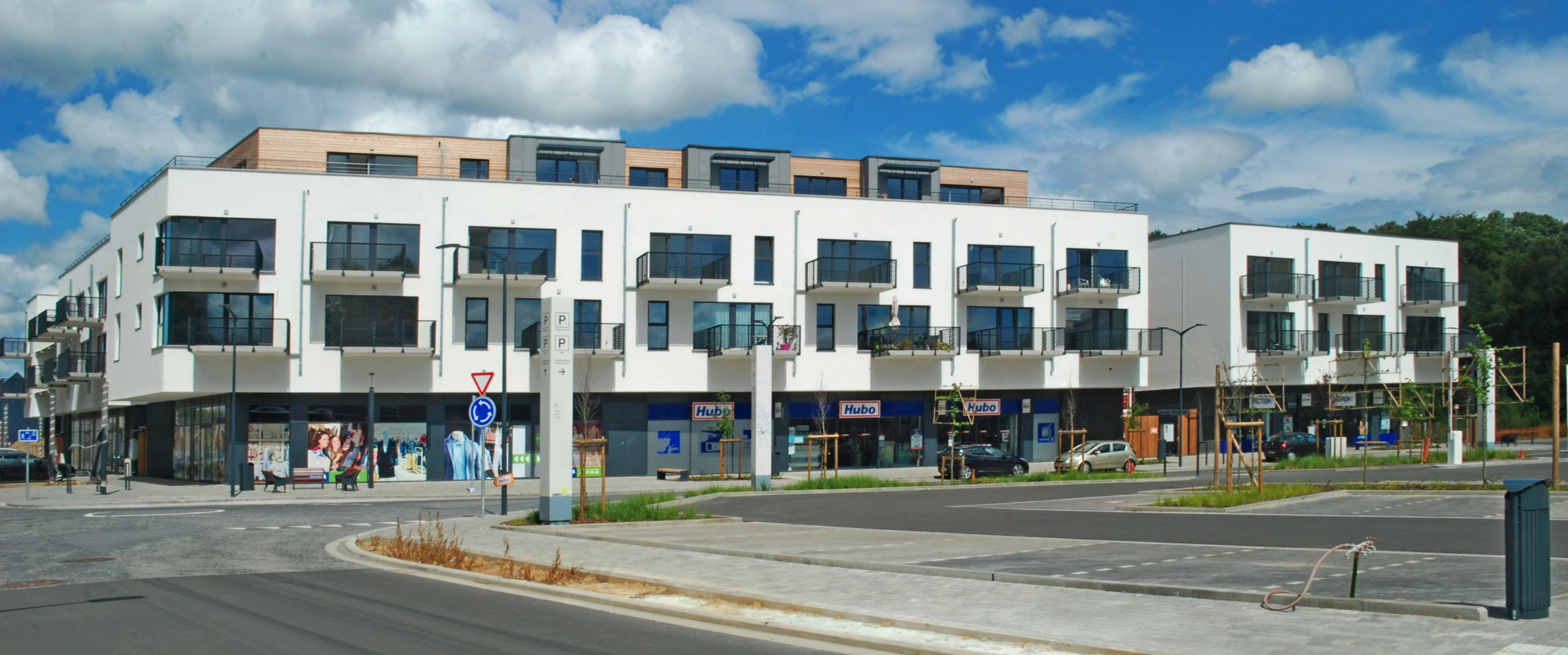 Belgique - Brabant wallon - Court-Saint-Étienne - « Court Village » (architecture postmoderne, bureau Altiplan, 2017)